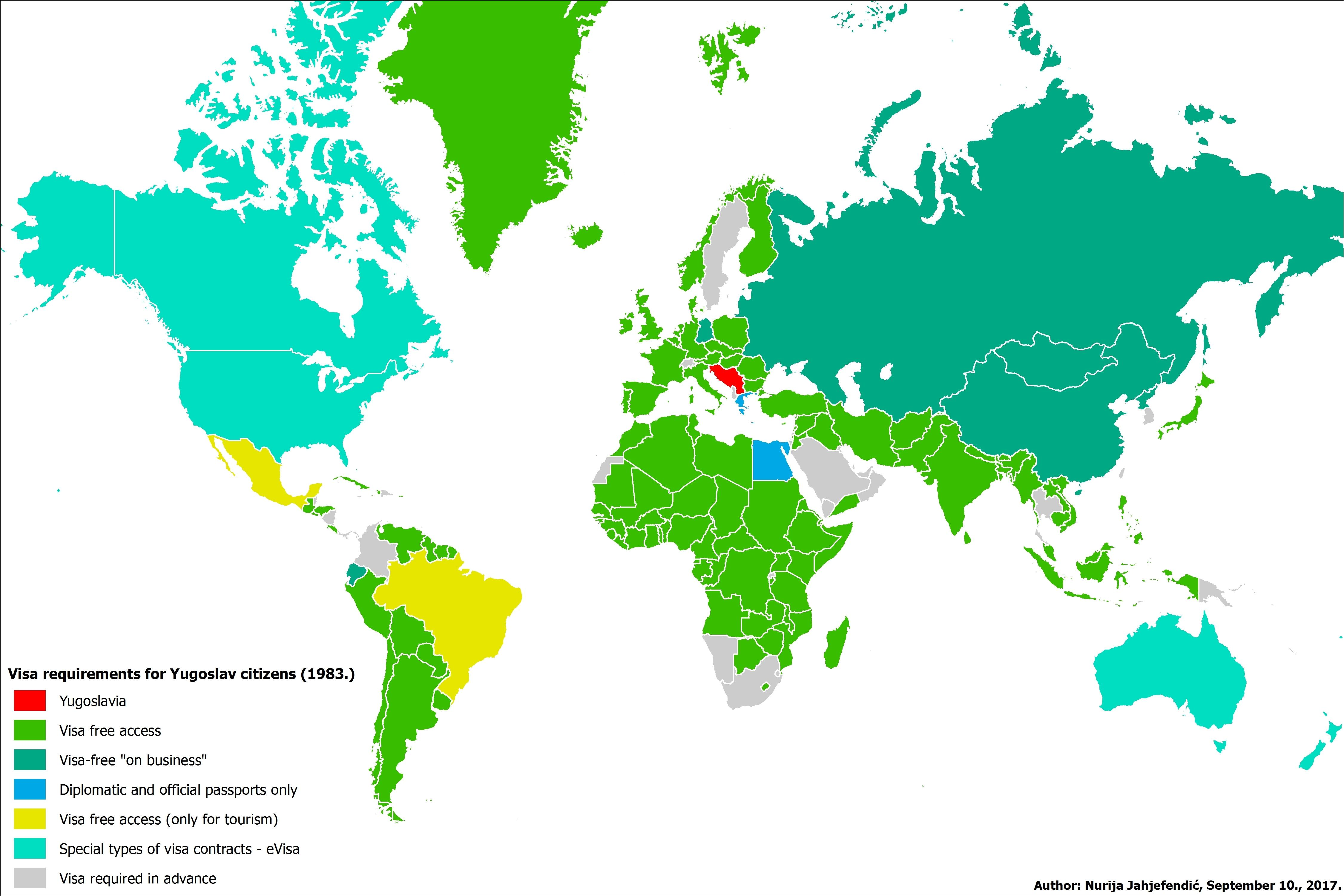 Srpskohrvatski / српскохрватски: Vizni režim za građane SFR Jugoslavije (stanje 1983. godine)